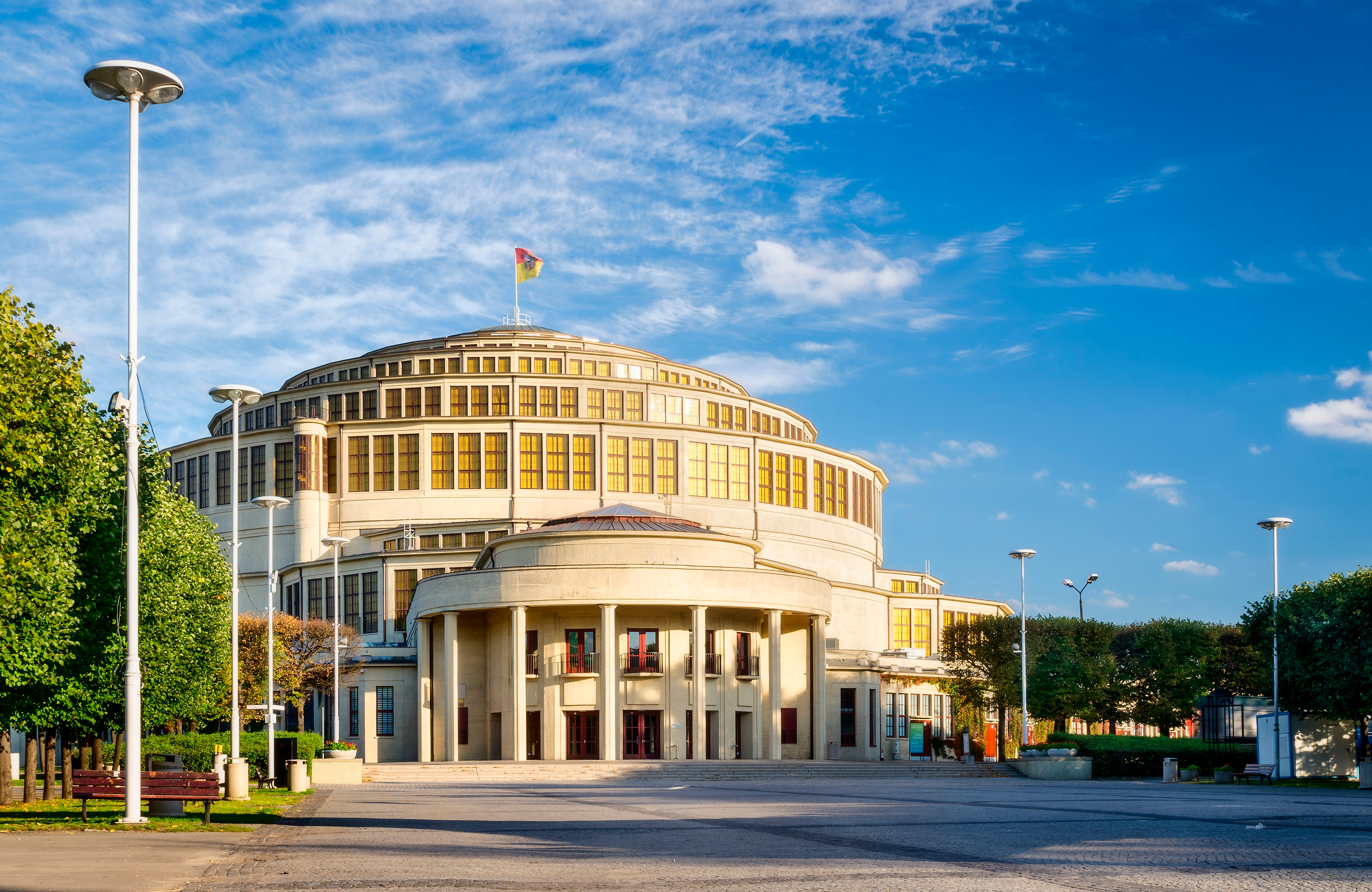 Wrocław, zespół Hali Stulecia